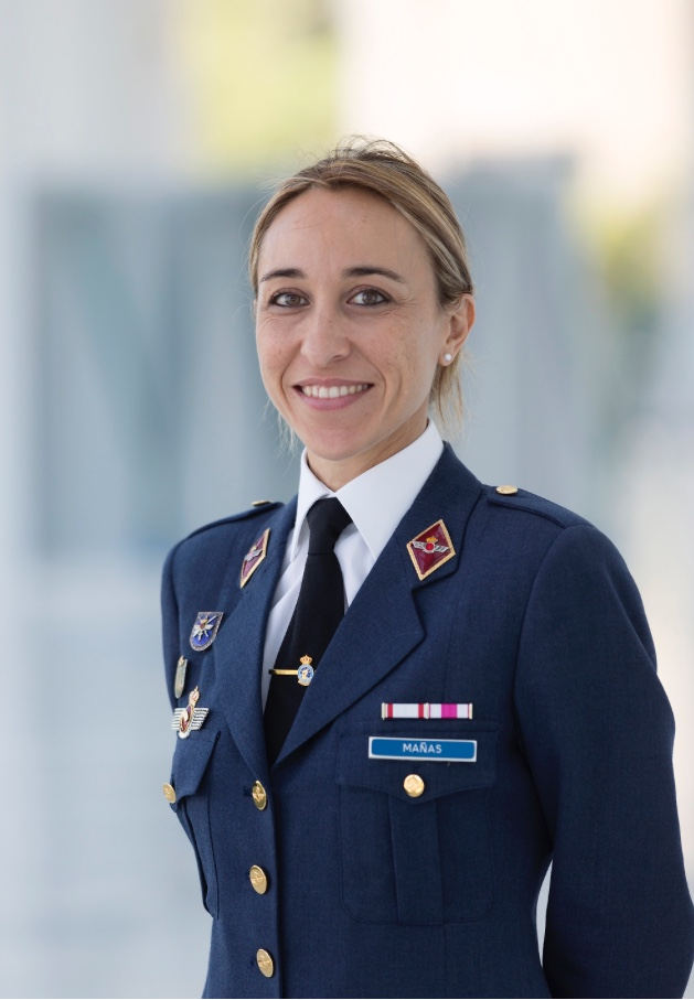 Pilar Mañas en la toma de posesión como Comandante y primera mujer en asumir el mando de una unidad en el Ejército del Aire de España, la unidad de la Escuadrilla de Circulación Aérea Operativa (ECAO Madrid). 2 de agosto de 2017